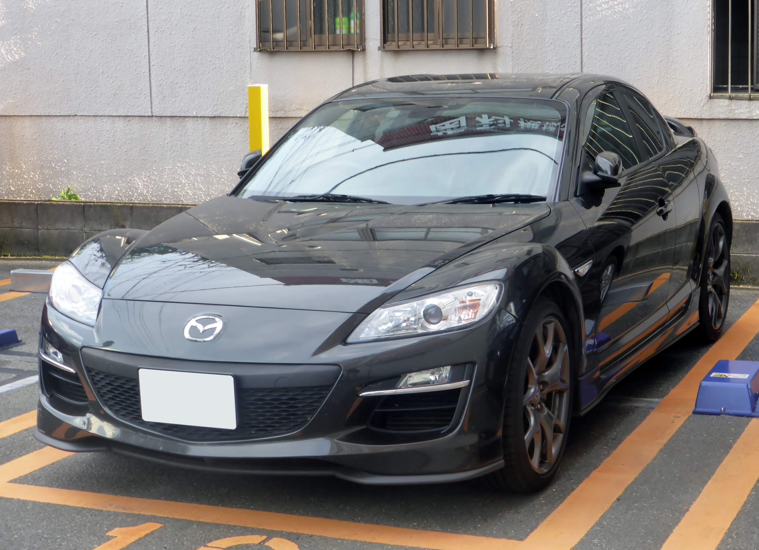 SE3P型マツダ・RX-8タイプRSをフロントから撮影。